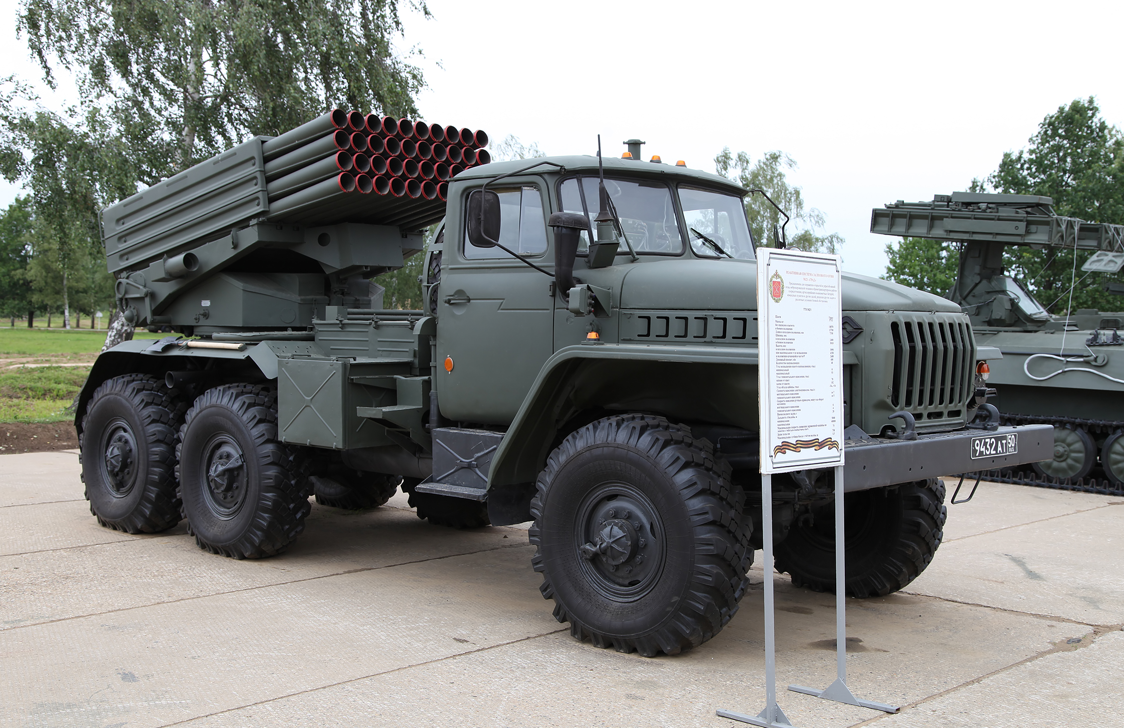 Боевая машина 2Б17-1 из состава РСЗО 9К51М Торнадо-Г